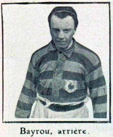 Georges Bayrou en 1905 (arrière du Gallia-Club).